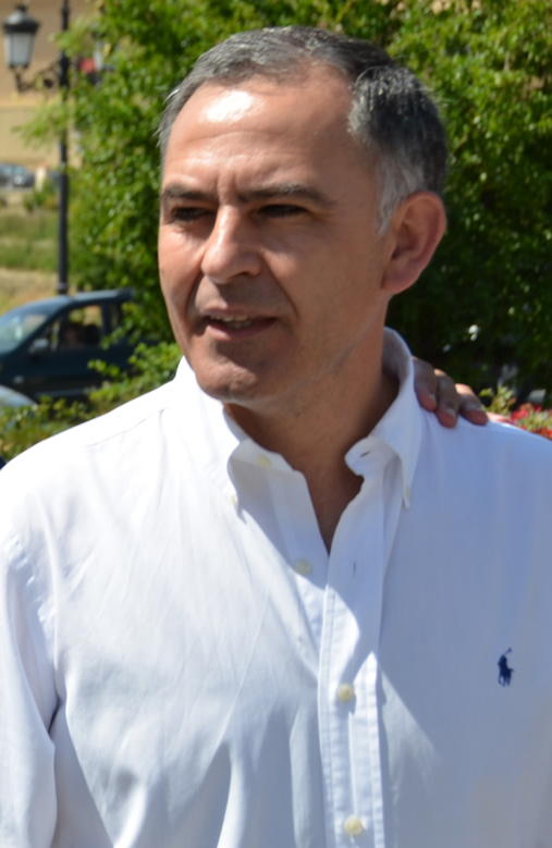 Recorte de una foto de Santiago Pérez López, realizada por mí.